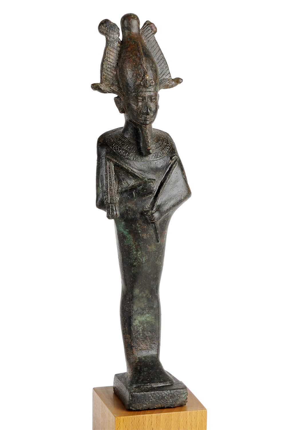 Figurine : Osiris Le dieu est figuré vêtu de la gaine momiforme, la tête surmontée de la couronne-atef, aux longues cornes torsadées, flanquée des plumes d'autruche, sur laquelle se dresse un uraeus. Son menton arborre la barbe tressée postiche et il porte un large collier finement ciselé. Dans son dos est incisé le contre-poids du collier. Il tient le flagellum et le sceptre-hekat, délicatement travaillés, croisés sur la poitrine. Sous le socle, le tenon permettait de fixer la statuette.